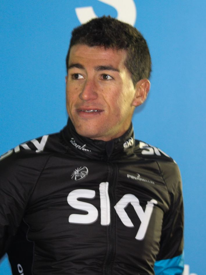 Sergio Henao en la Vuelta al País Vasco 2013